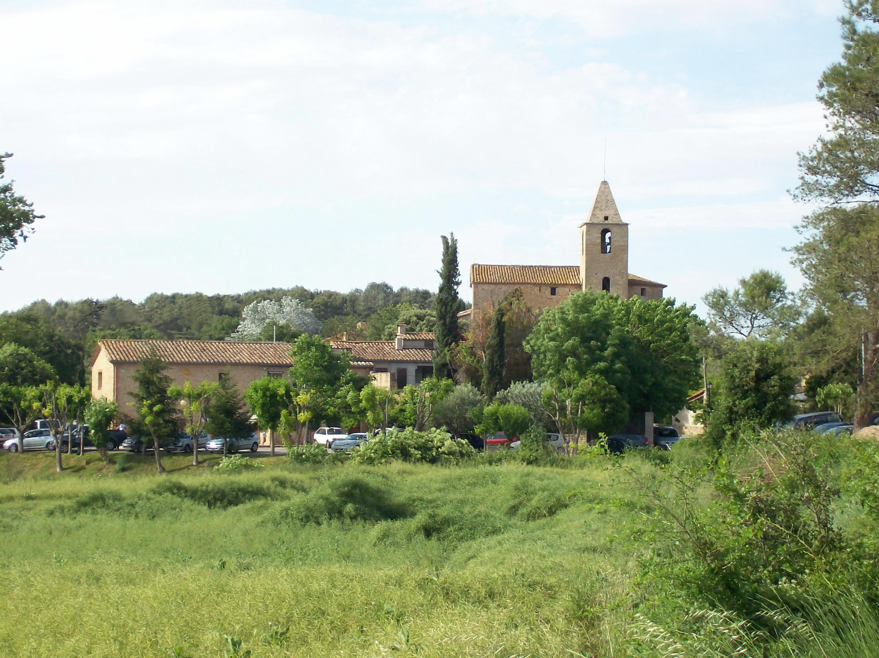 Vista llunyana del pobla de Vilamarí